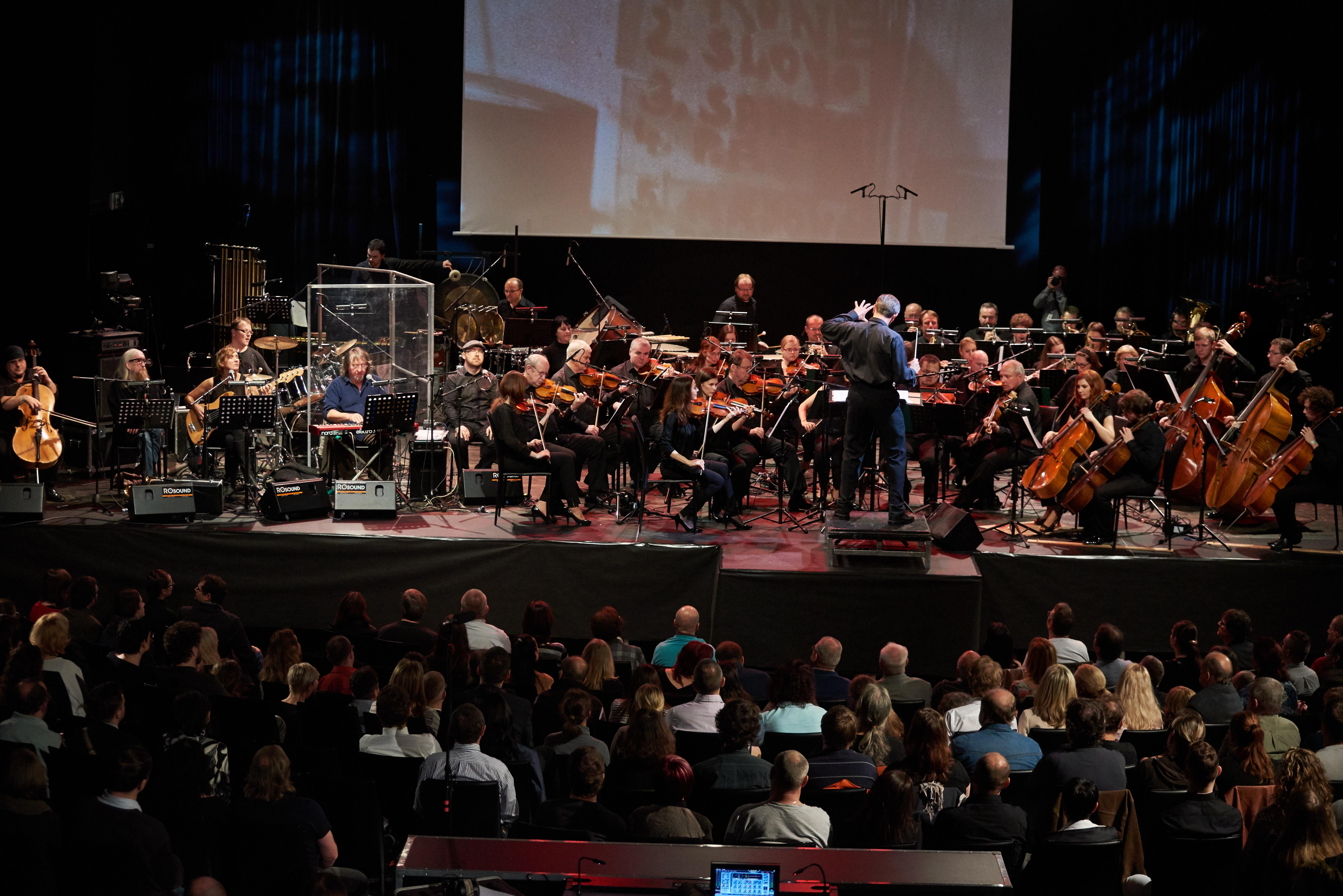 The Plastic People of the Universe a Filharmonie Brno - Co znamená vésti koně. Koncert v SONO Centru brno, 17.11.2015. Ćlenové: Vratislav Brabenec, Josef Janíček, Jaroslav Kvasnička, Eva Turnová hosté: Michal Nejtek, Josef Klíč dirigent: Pavel Šnajdr.